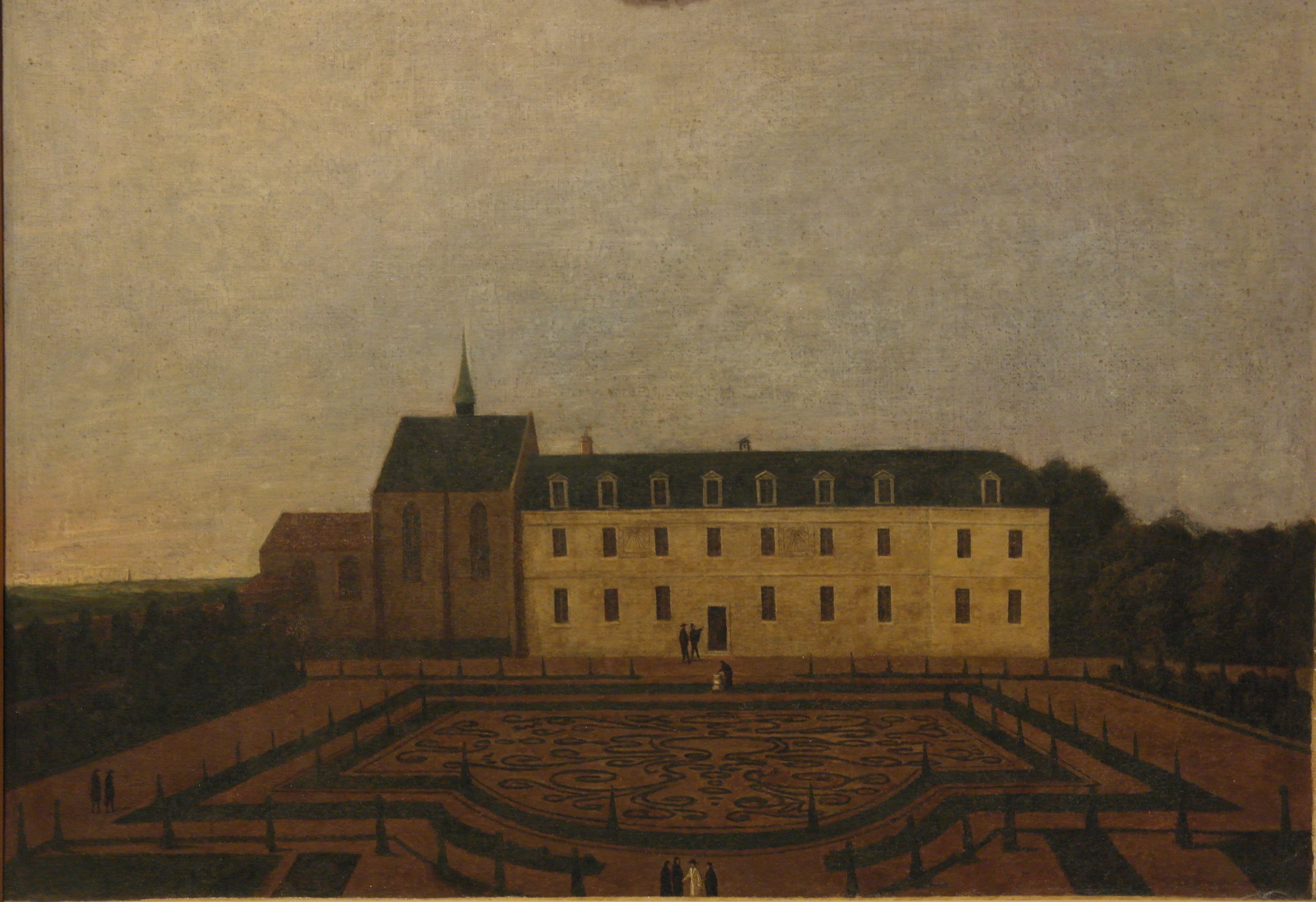 Tableau anonyme représentant la maladrerie Saint-Lazare au XVIIIè siècle. Largement remanié, le monument a laissé place au bâtiment Hugo de la cité scolaire Augustin-Thierry. Collections du musée des beaux-arts de Blois.